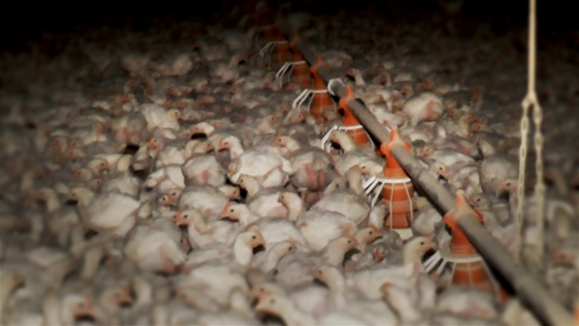 Cette photo est extraite d'une vidéo tournée fin 2017 dans un élevage Optigal du groupe Migros, dans le canton de Vaud en Suisse. 12’700 poulets vivent enfermés dans cet élevage.